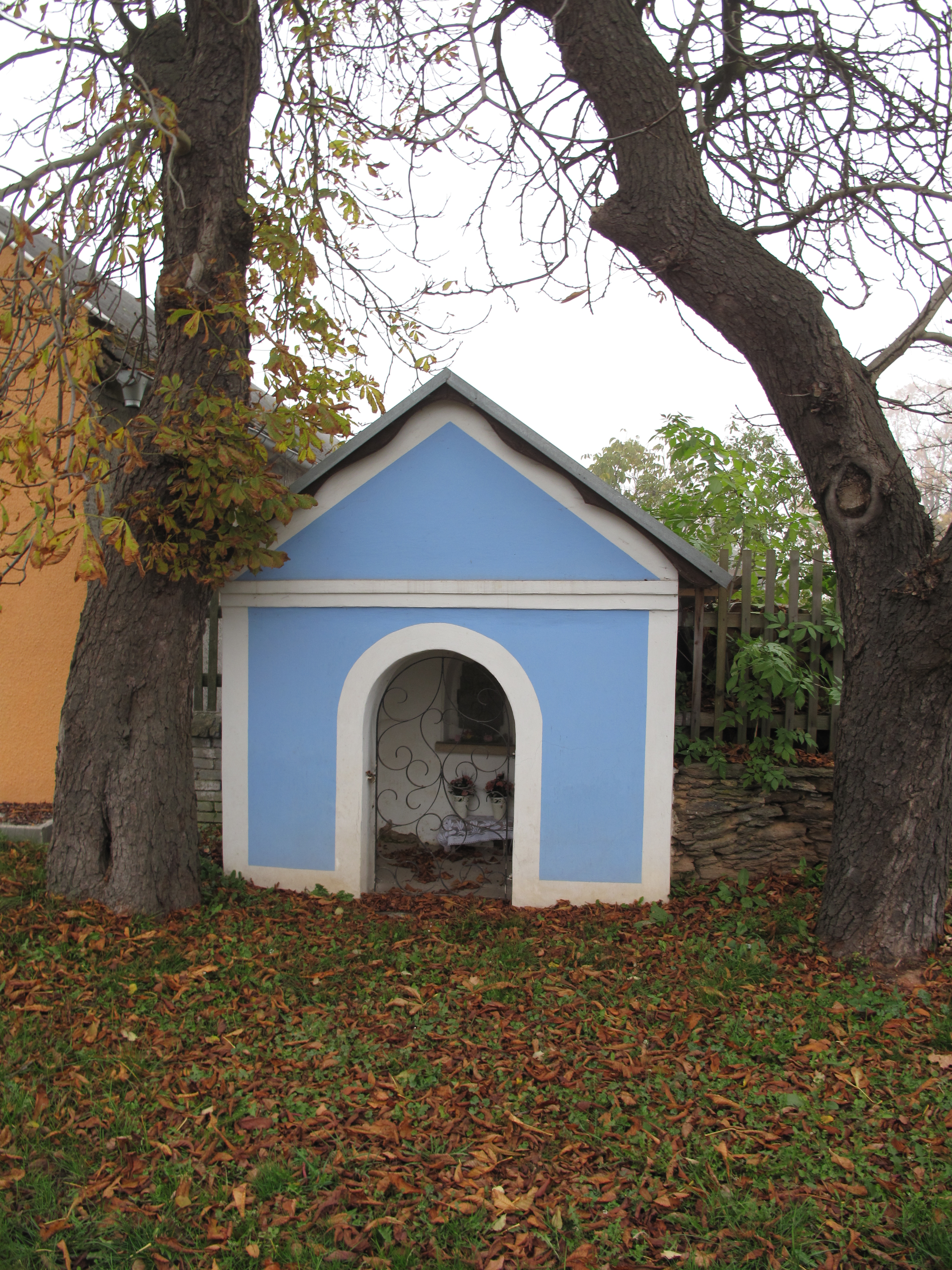 Kaple v Prohoři. Okres Karlovy Vary, Česká republika.